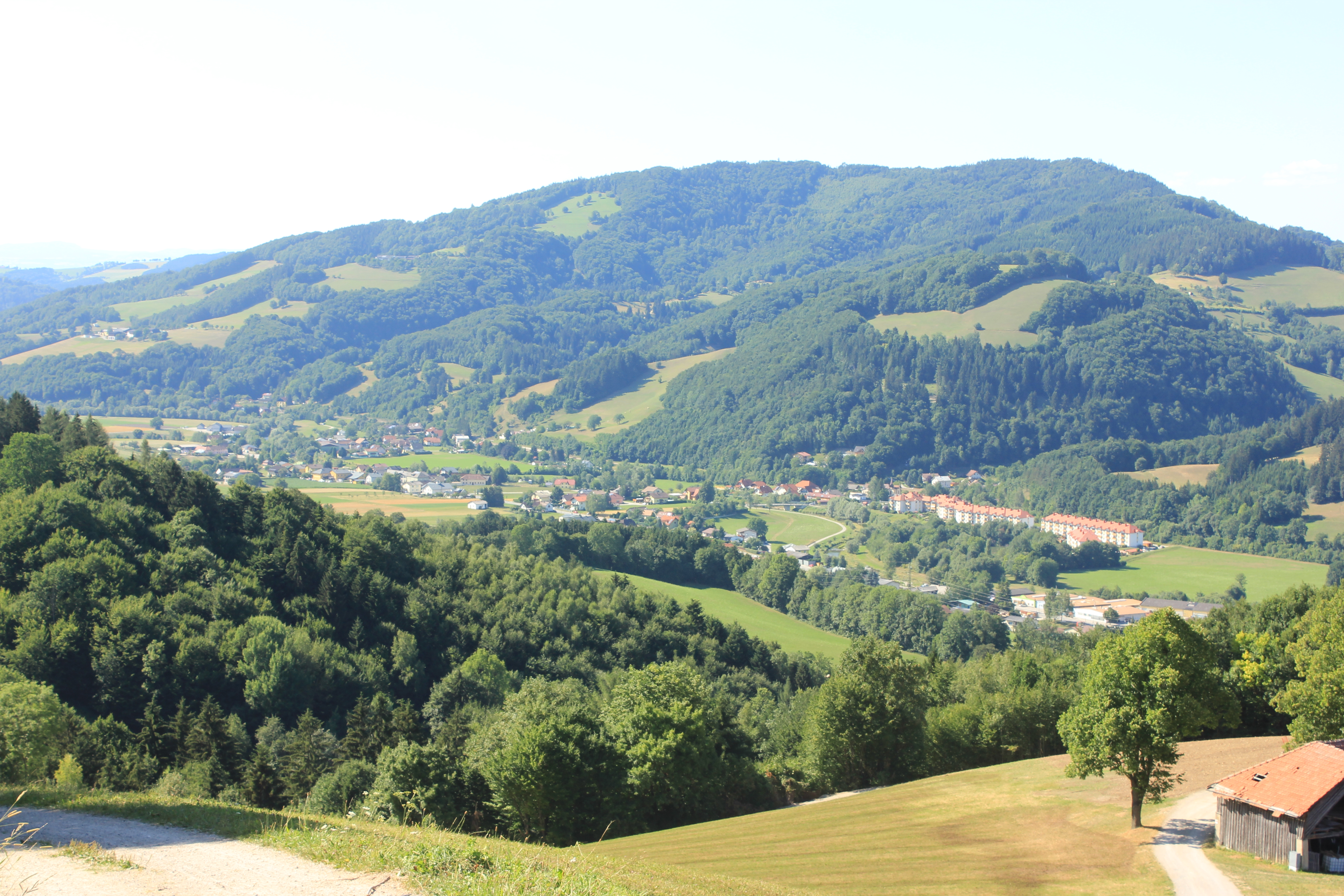 Das Gölsental zwischen St. Veit und Traisen, vom Staff aus gesehen.